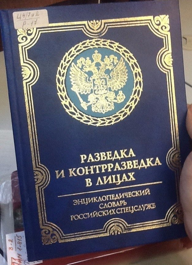 Титульный лист энциклопедии русской военной разведки, где указано упоминание про Тонких Ивана Васильевича